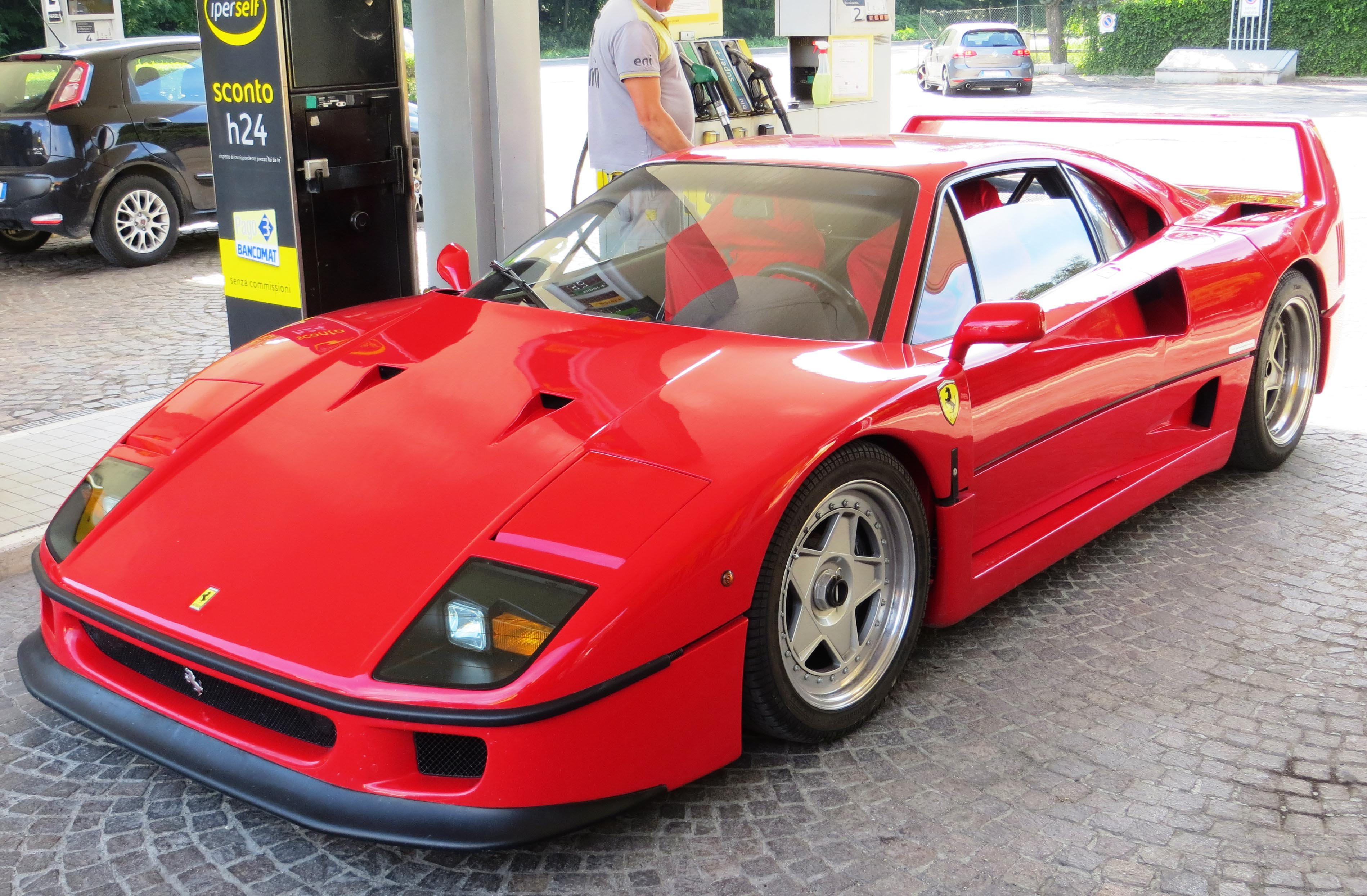 Ferrari F40, foto scattata da me il 6.6.14